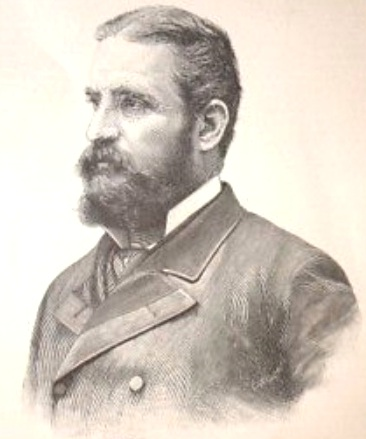 Il Senatore Ignazio Florio – Stampa del 1891